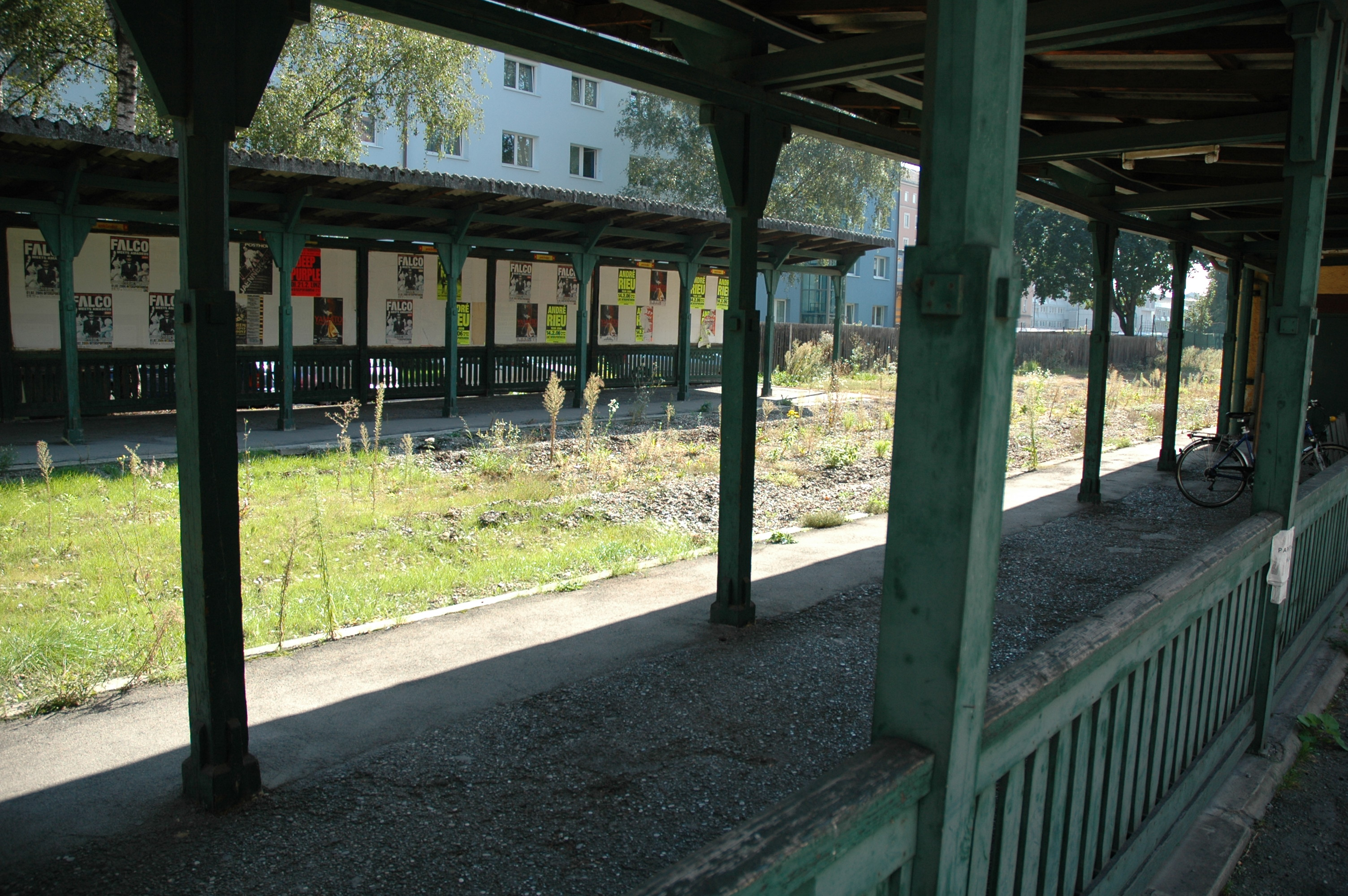 ehemaliger Bahnhof der Linzer Lokalbahn (LiLo) in Linz.